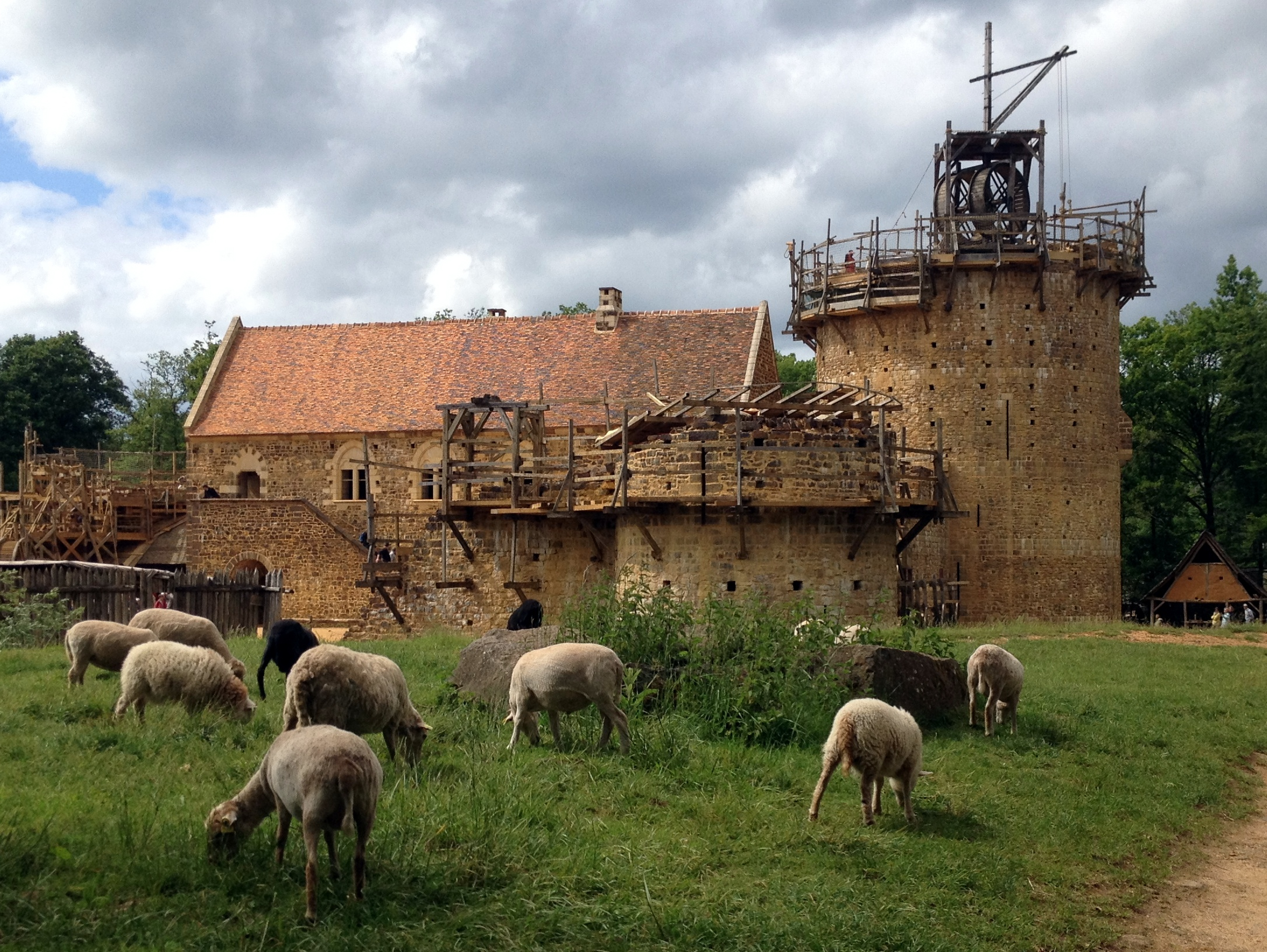 Château du Guédelon, fin mai 2014.